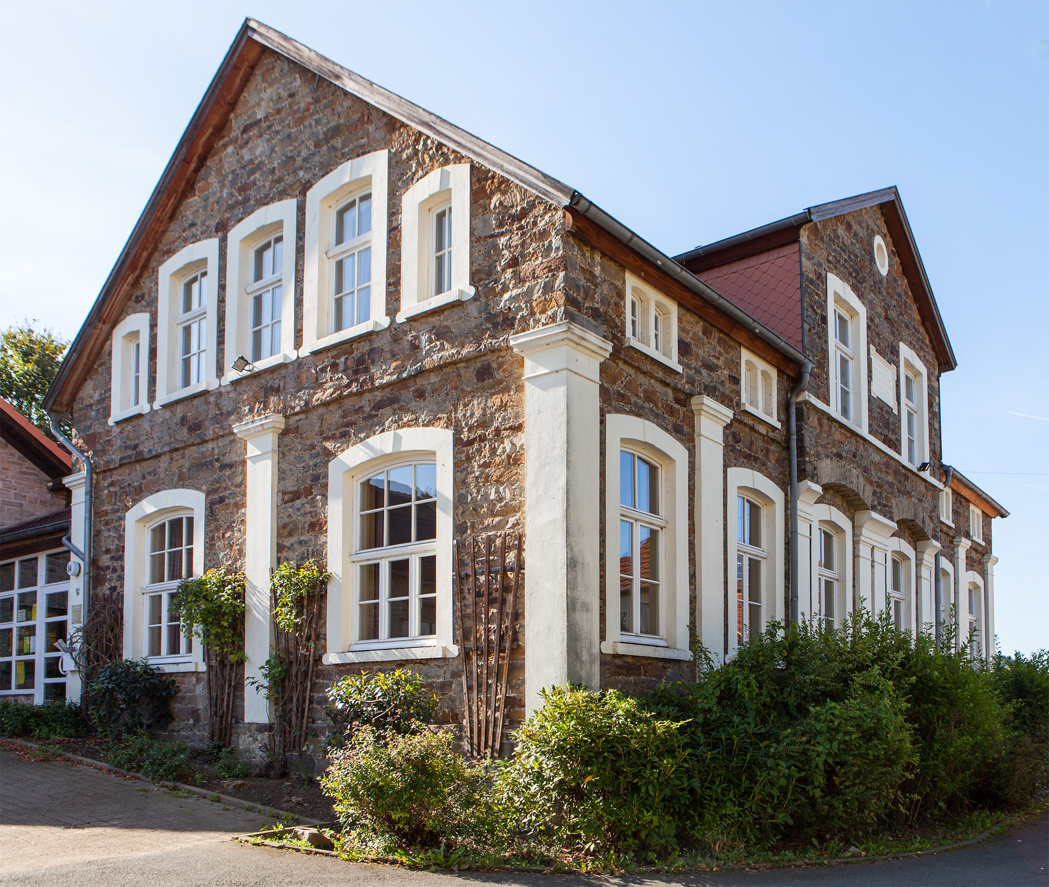 Almena (Extertal), Fütiger Str. 34, Alte SchuleThis is a photograph of an architectural monument.